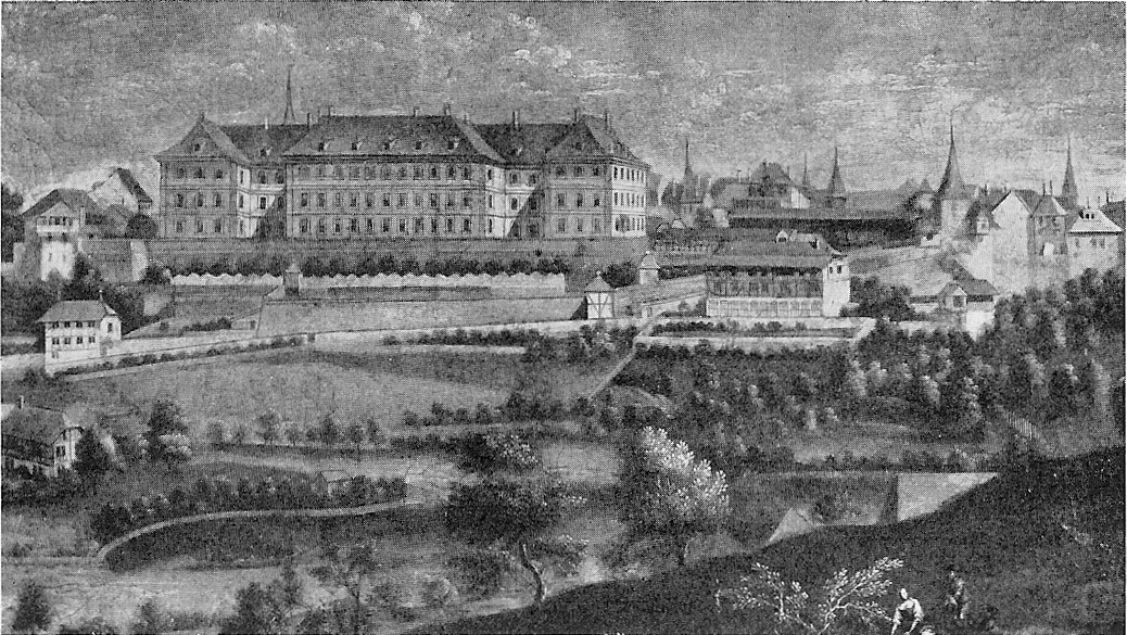 Das alte Inselspital in Bern im Jahr 1742 (heute Standort des Bundeshauses). Ansicht von Süden her.